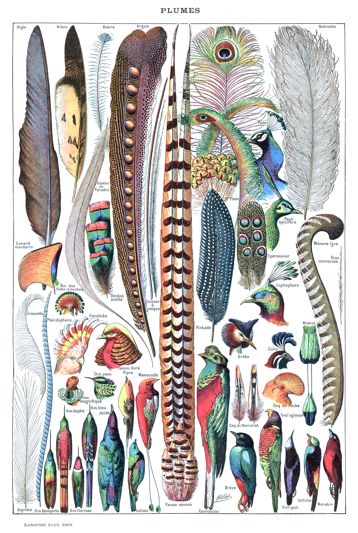 Plumes. Illustré par Adolphe Millot dans Larousse pour tous [1907-1910]. Aigle, Hibou, Goura, Argus, Paon, Autruche, Canard, Dindon, Pintade, Aigrette, Faisan etc.